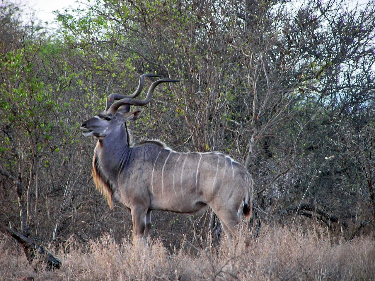 Großer Kudu - fotografiert im Kruger Park in Südafrika.